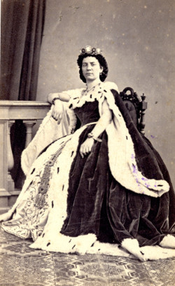 Luigia Bendazzi